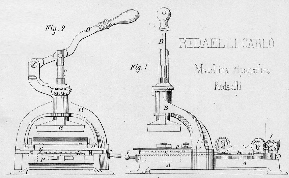 Disegno della macchina tipografica Radaelli di Carlo Radaelli, in "Bollettino delle privative industriali del Regno d'Italia", 1877, 8 (AS Avellino, Fondo Prefettura, inventario I, b. 119, vol. 498, fascicolo 4027)